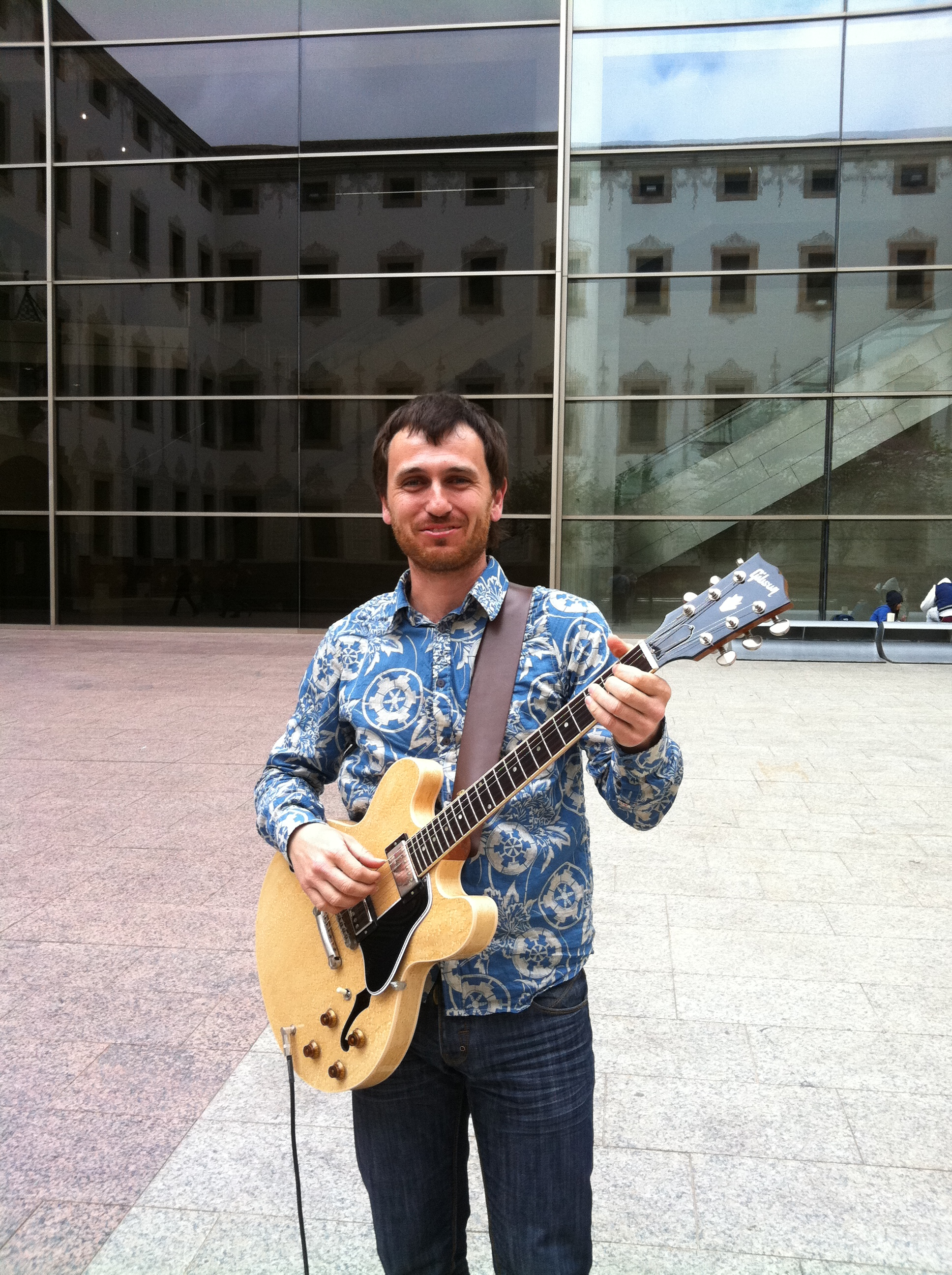 Sanjosex